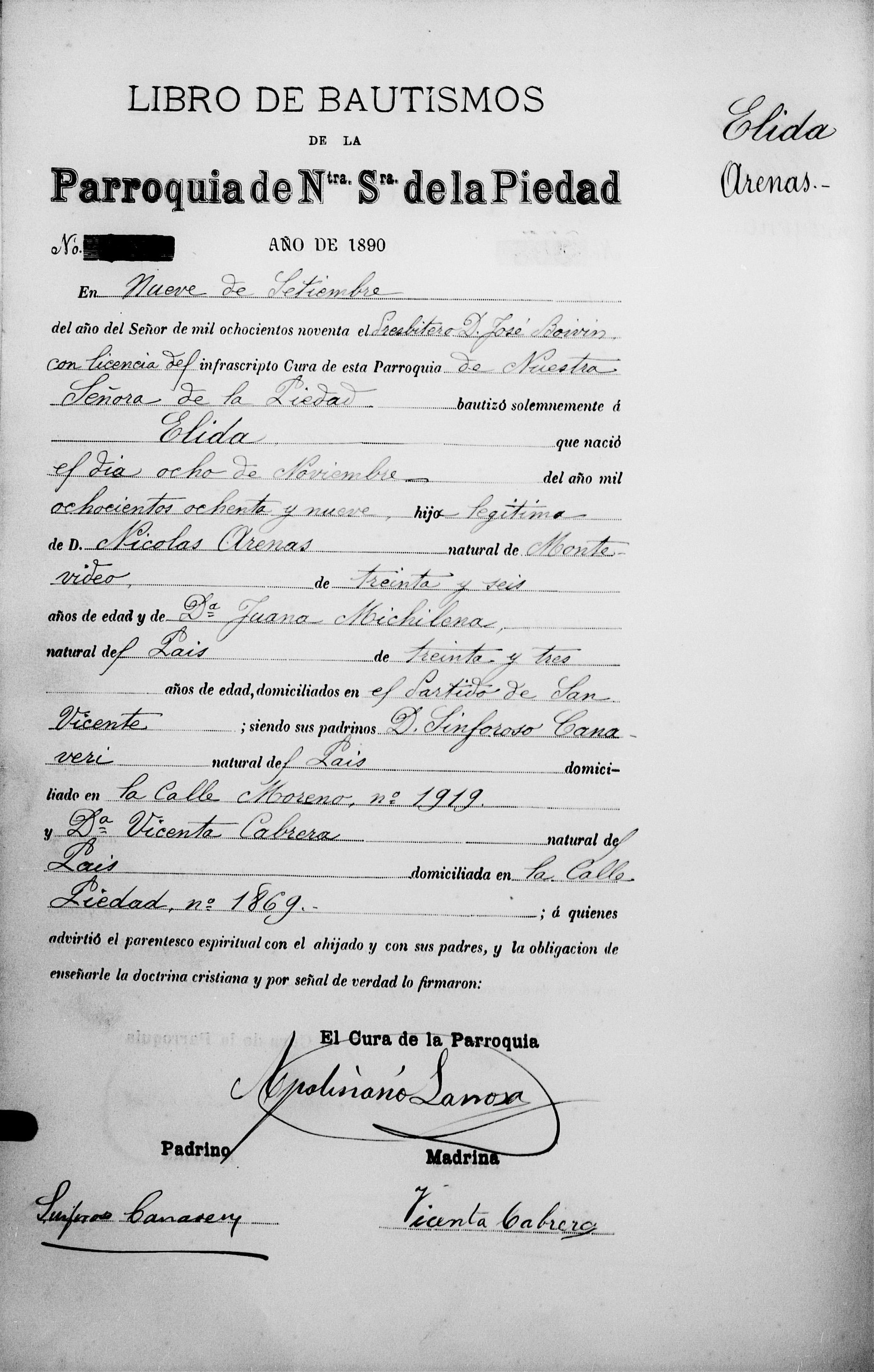 Registro de bautismo de Elida Arenas, hija de Nicolás Arenas y Juana Michelena. Padrinos Sinforoso Canavery y Vicenta Cabrera. No debe confundirse la familia Michelena Canaveris con la de Juan Ángel Michelena Moreno, militar realista, y la de su hijo Juan Ángel Michelena del Pino, nacido en Buenos Aires, quien sirvió en el ejército español.